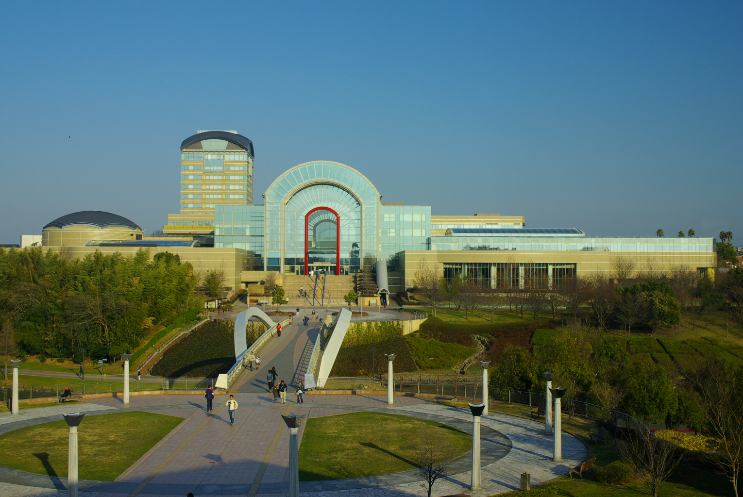 あいち健康プラザ全景。西側より